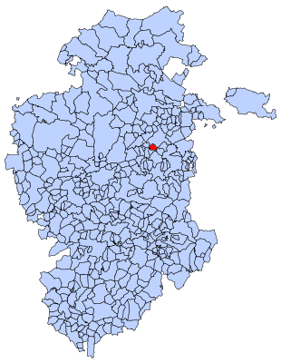 Prádanos de Bureba en Burgos